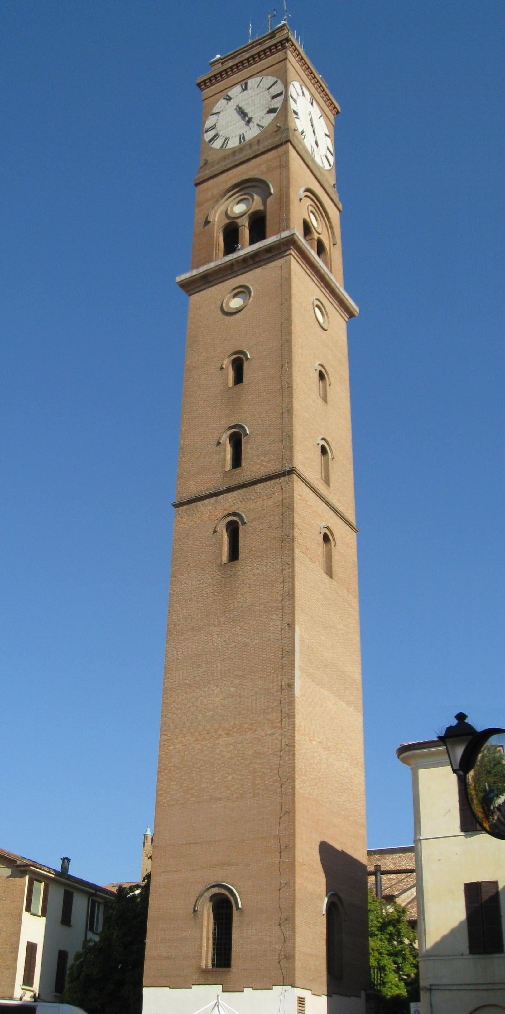 perkele, foto autoprodotta